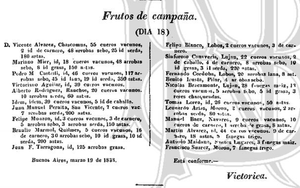 cueros para el abasto de la ciudad de Buenos Aires, aportados por el comerciante Sinforoso Canaveris Rodríguez, del partido de Luján, Provincia de Buenos Aires.